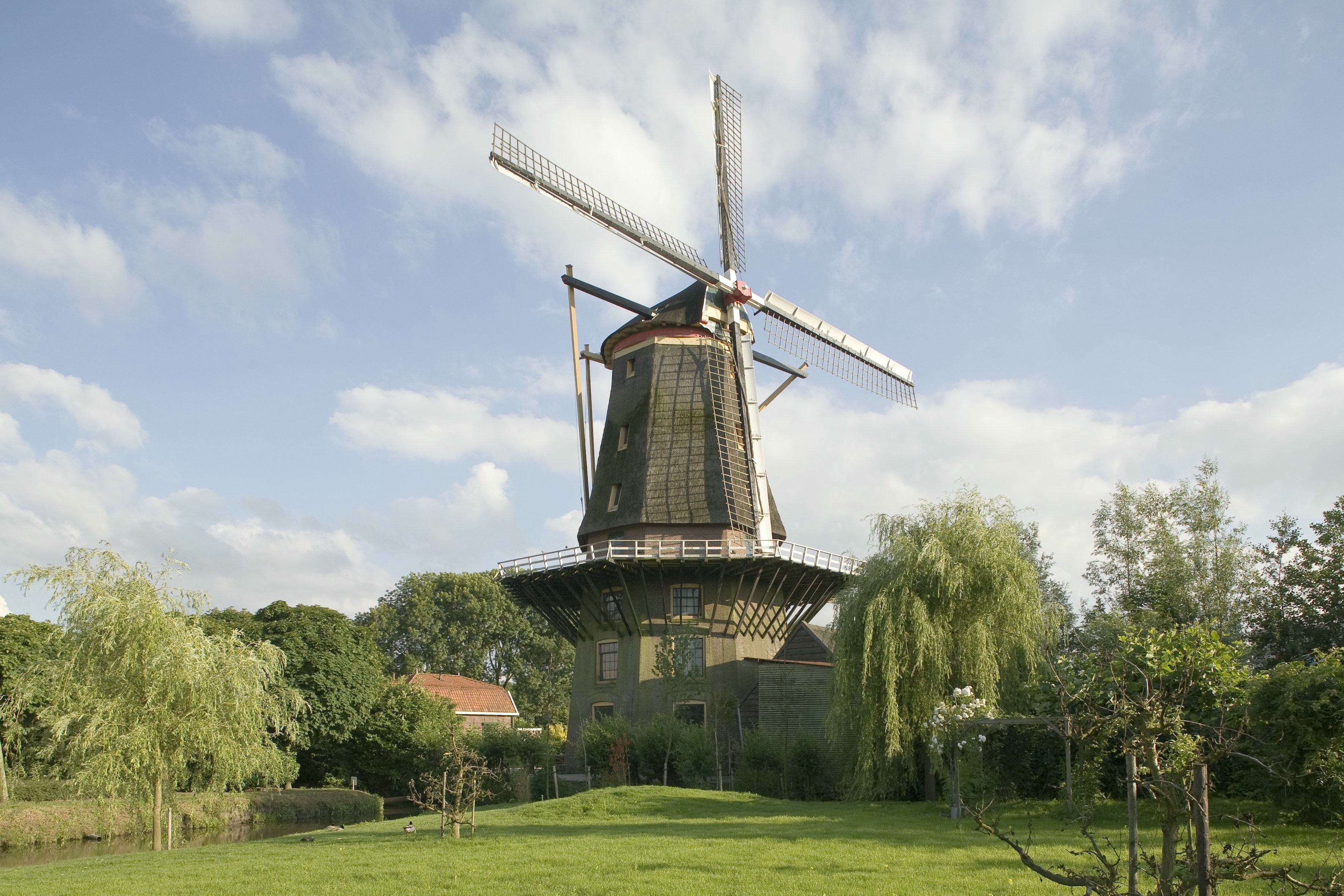 Korenmolen "Jan van Arkel": Overzicht van de molen (opmerking: Project RRWR)